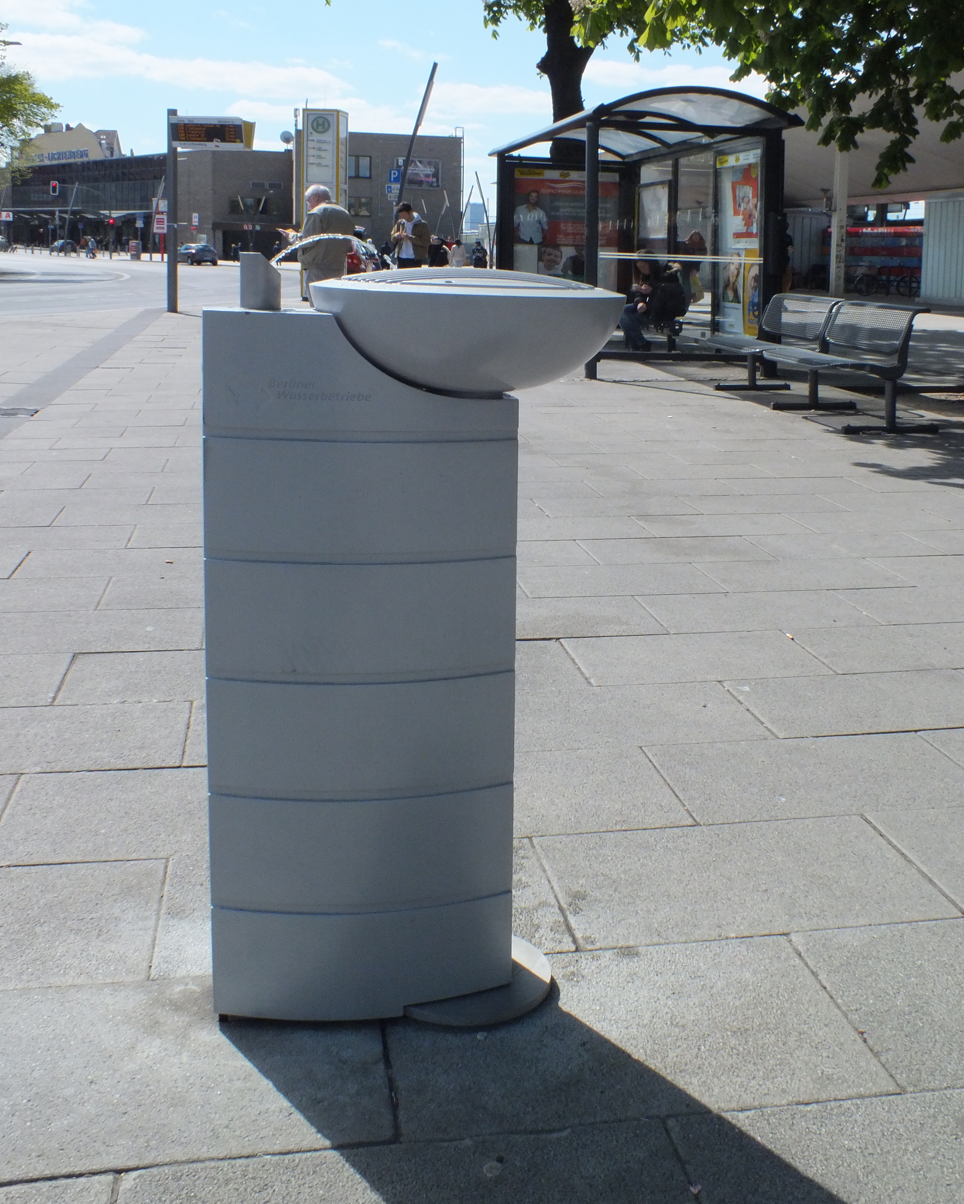 Trinkbrunnen nahe Bh. Lichtenberg